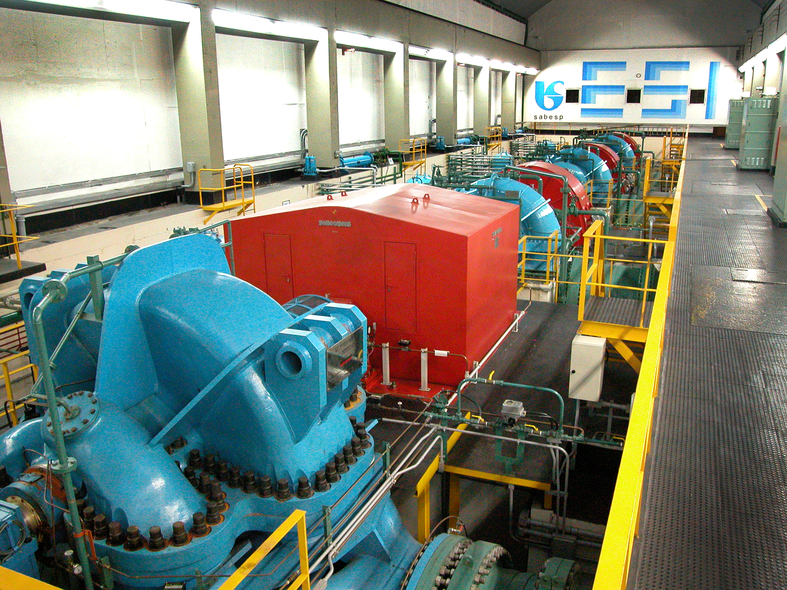 Estação Elevatória Santa Inês